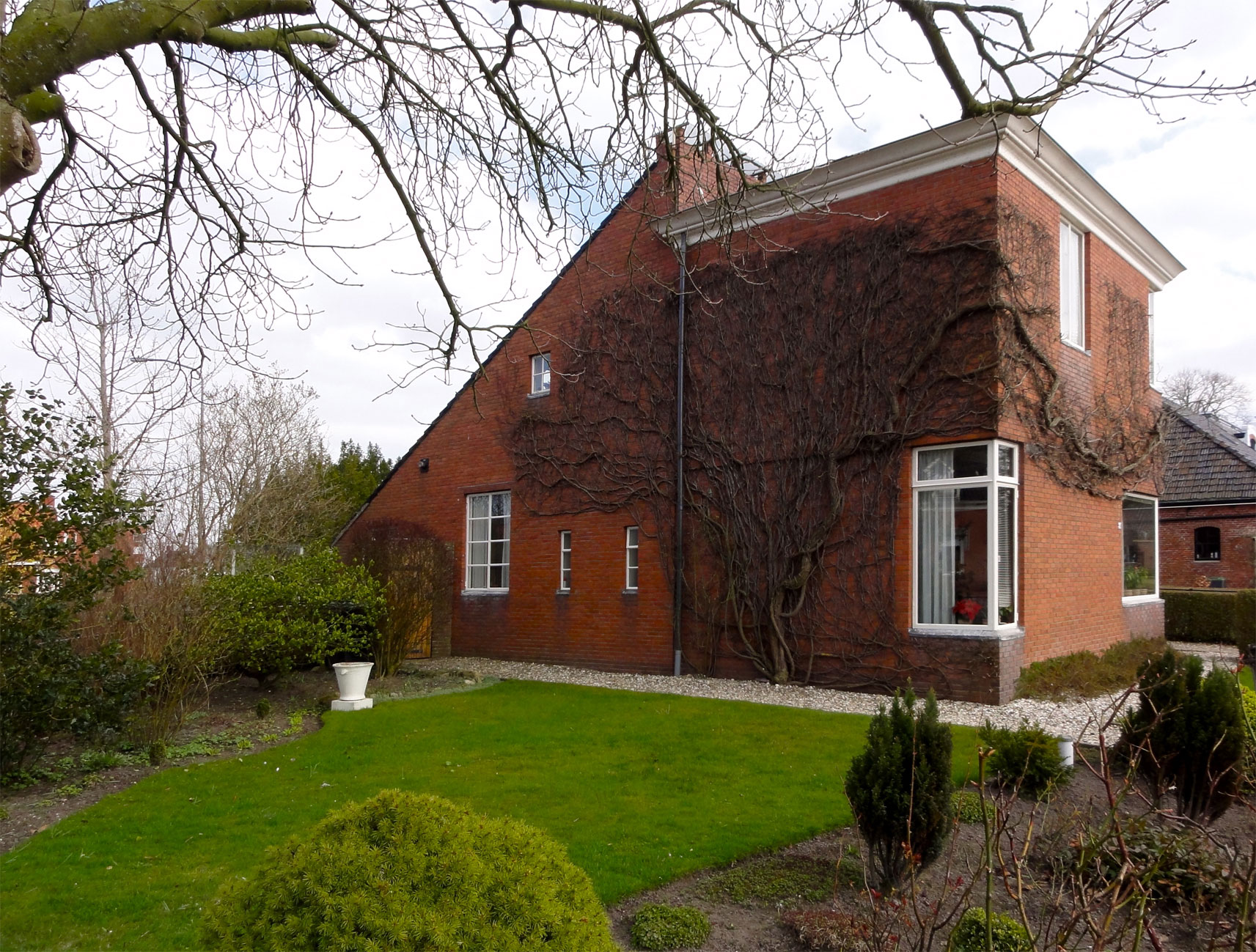 Voormalige atelierwoning van Ekke Kleima Oosterstraat 58 te Warffum